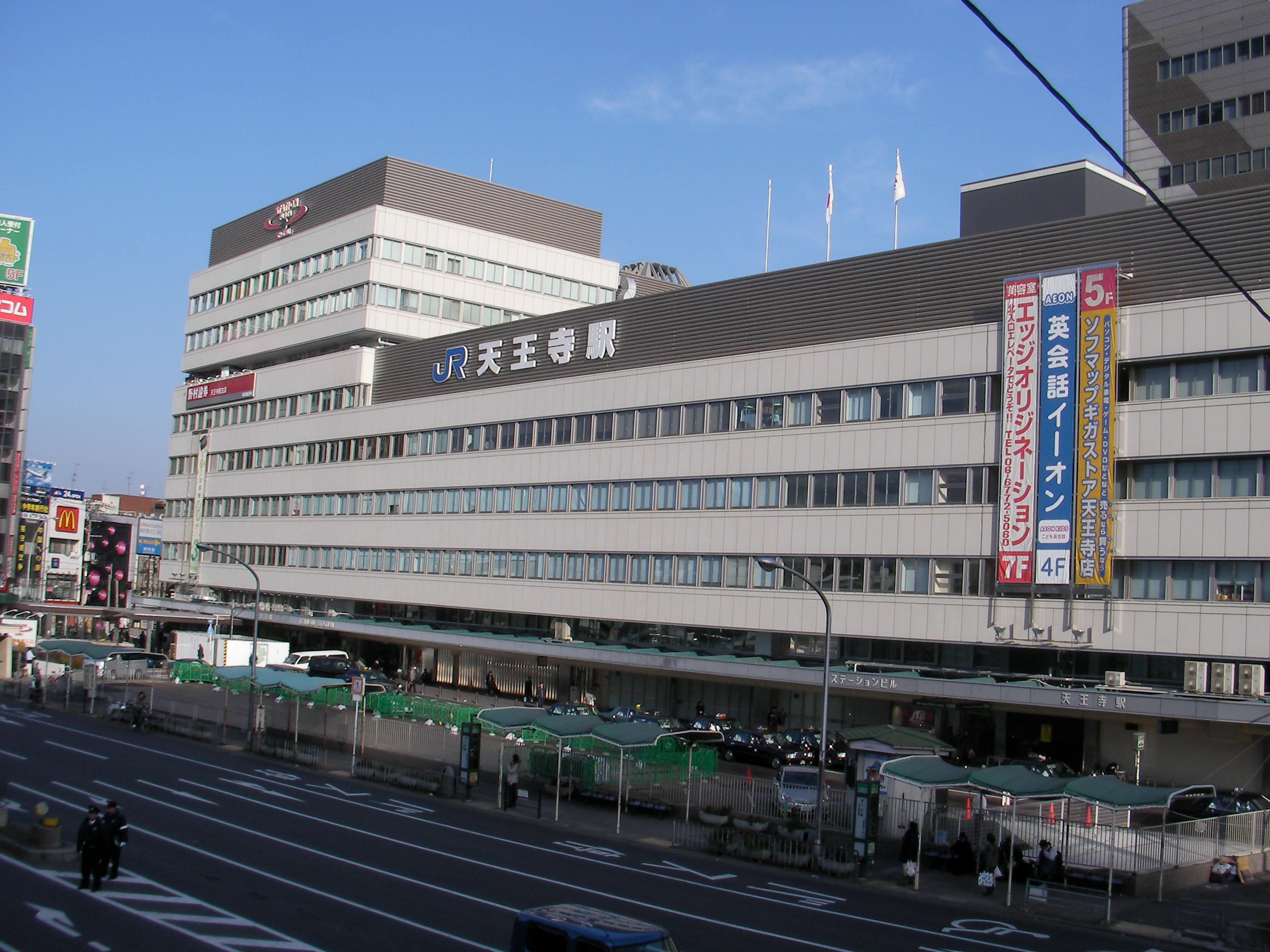 JR西日本 天王寺駅正面口